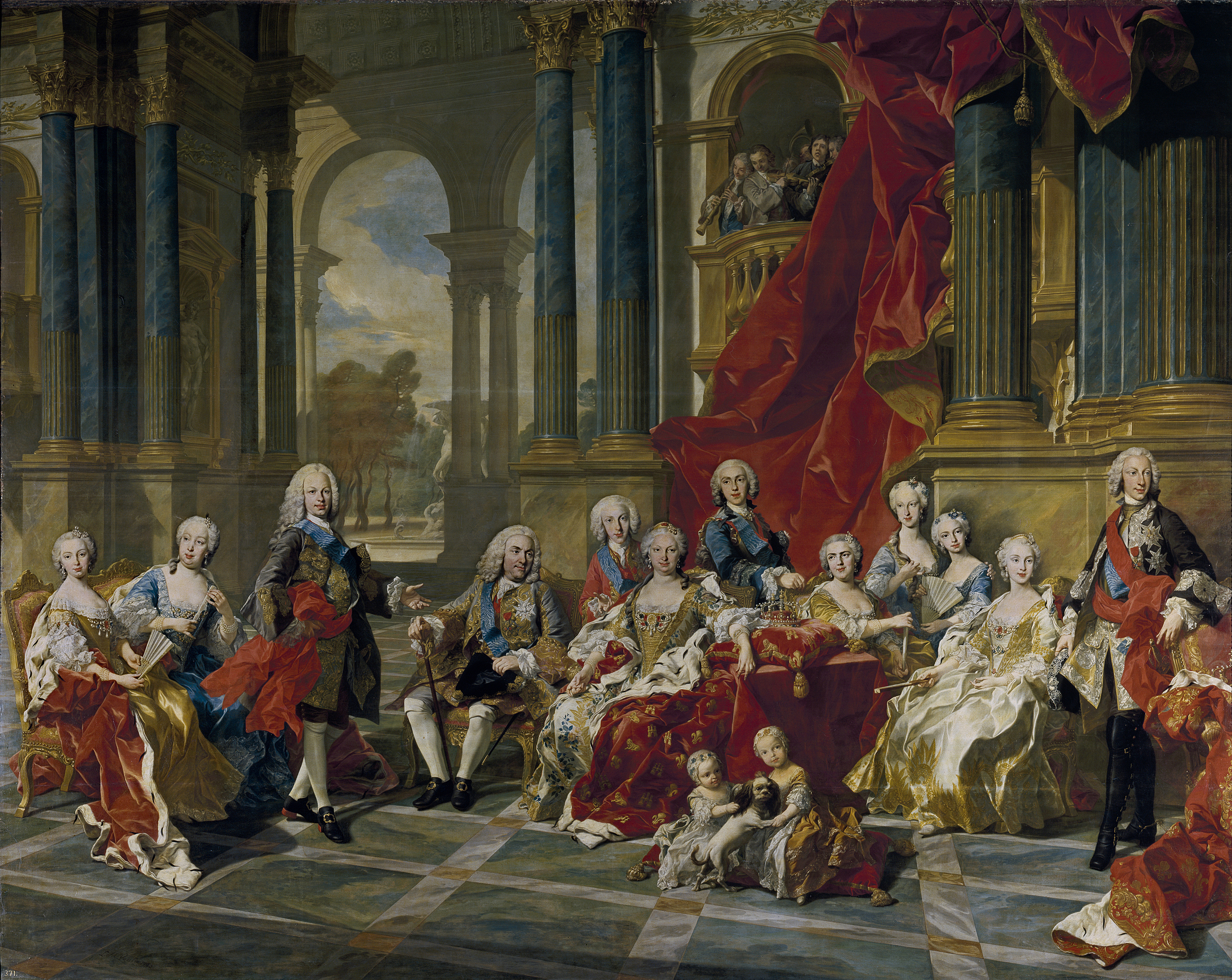 La obra muestra a los miembros de la familia del rey Felipe V de España (1683-1746), que fue nieto del rey Luis XIV de Francia y el primer monarca de la Casa de Borbón en España.